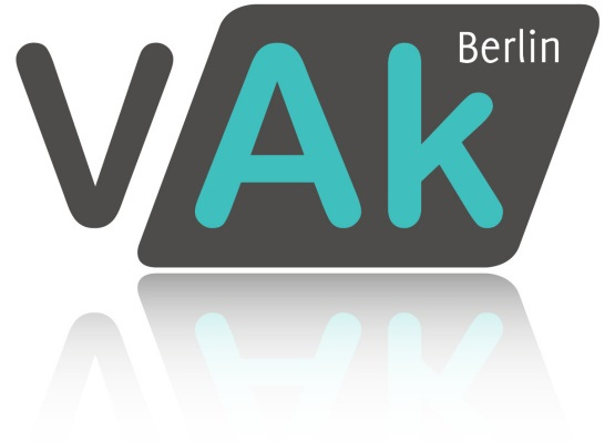 Logo der Verwaltungsakademie Berlin